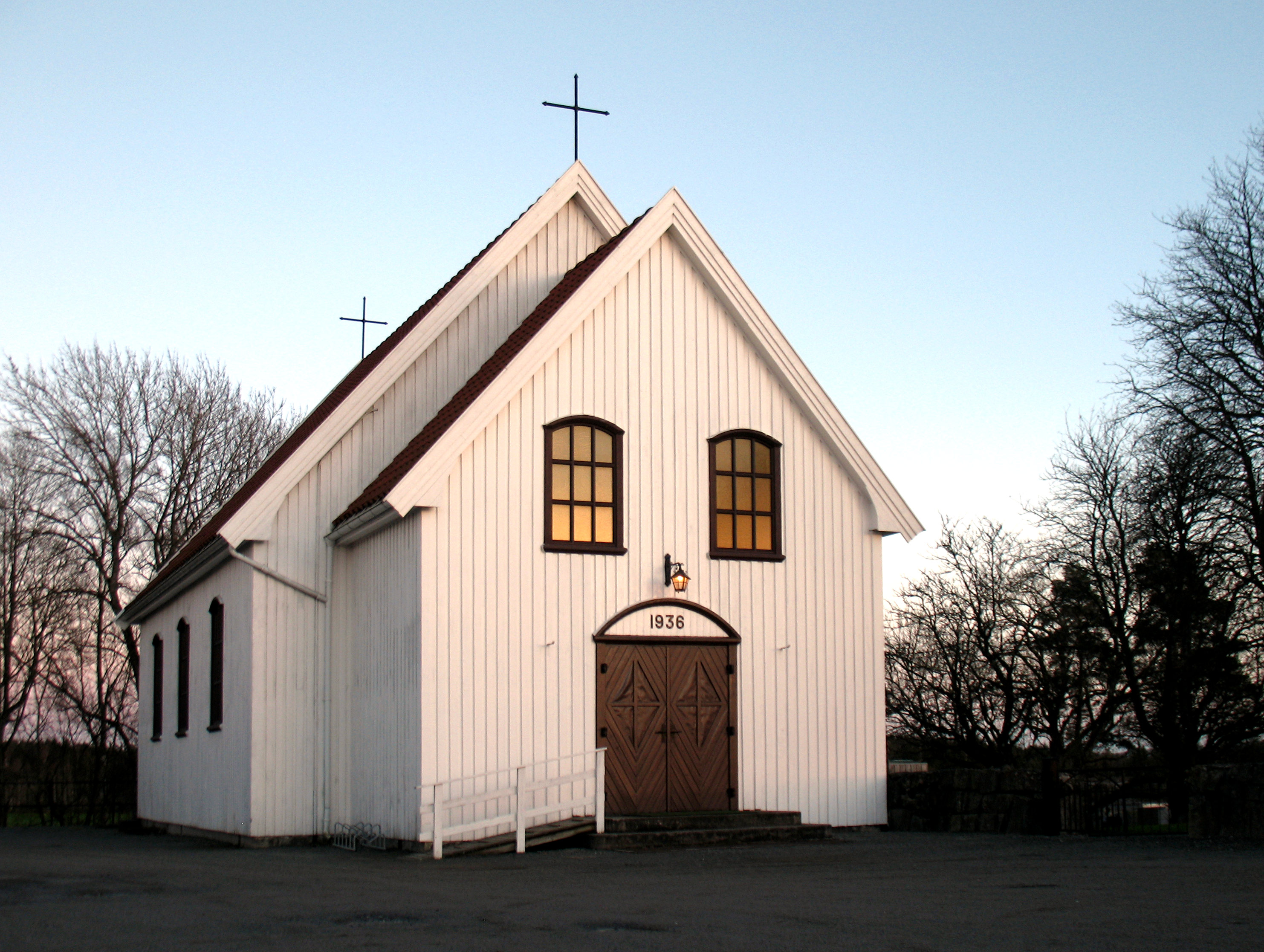 Skiptvet kirkes kapell bygd i Skiptvet kommune, Østfold, i 1936.